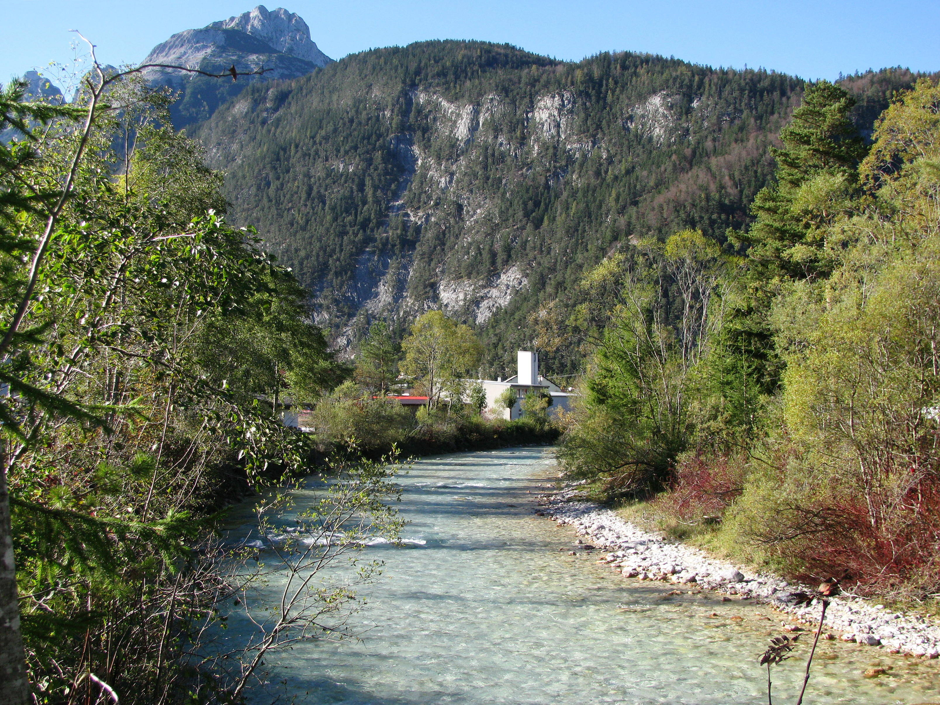 Die Isar in Scharnitz, mit Bergen der Arnspitzgruppe im Hintergrund.